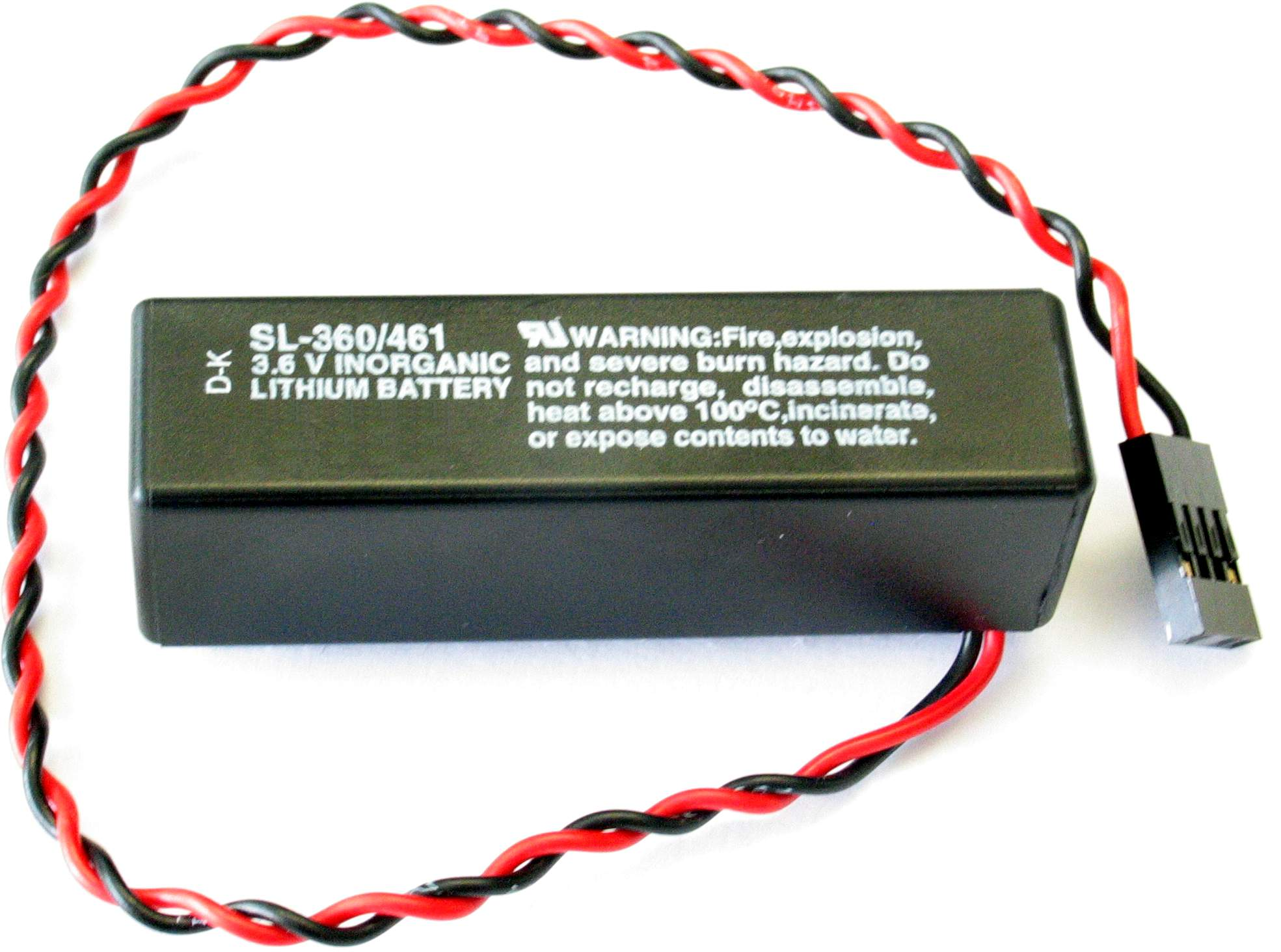 "Sonnenschein" lithium battery 3.6V, company logo removed